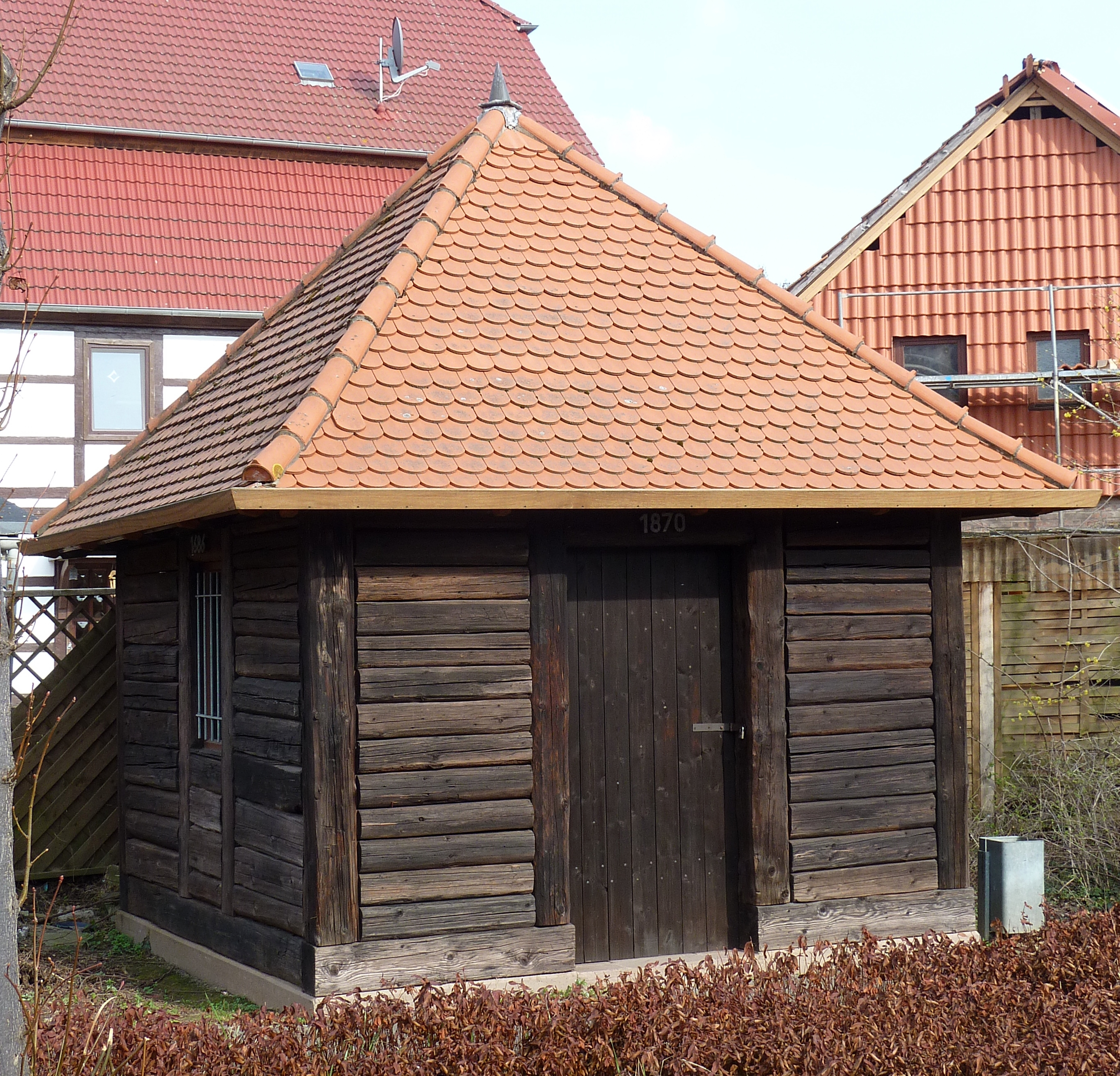 Solehaus der Saline Sülbeck, Stadt Einbeck, Niedersachsen. Original erbaut 1686, abgerissen in den 1960er Jahren, wiederaufgebaut 1992 mit Hölzern eines anderen Salinengebäudes